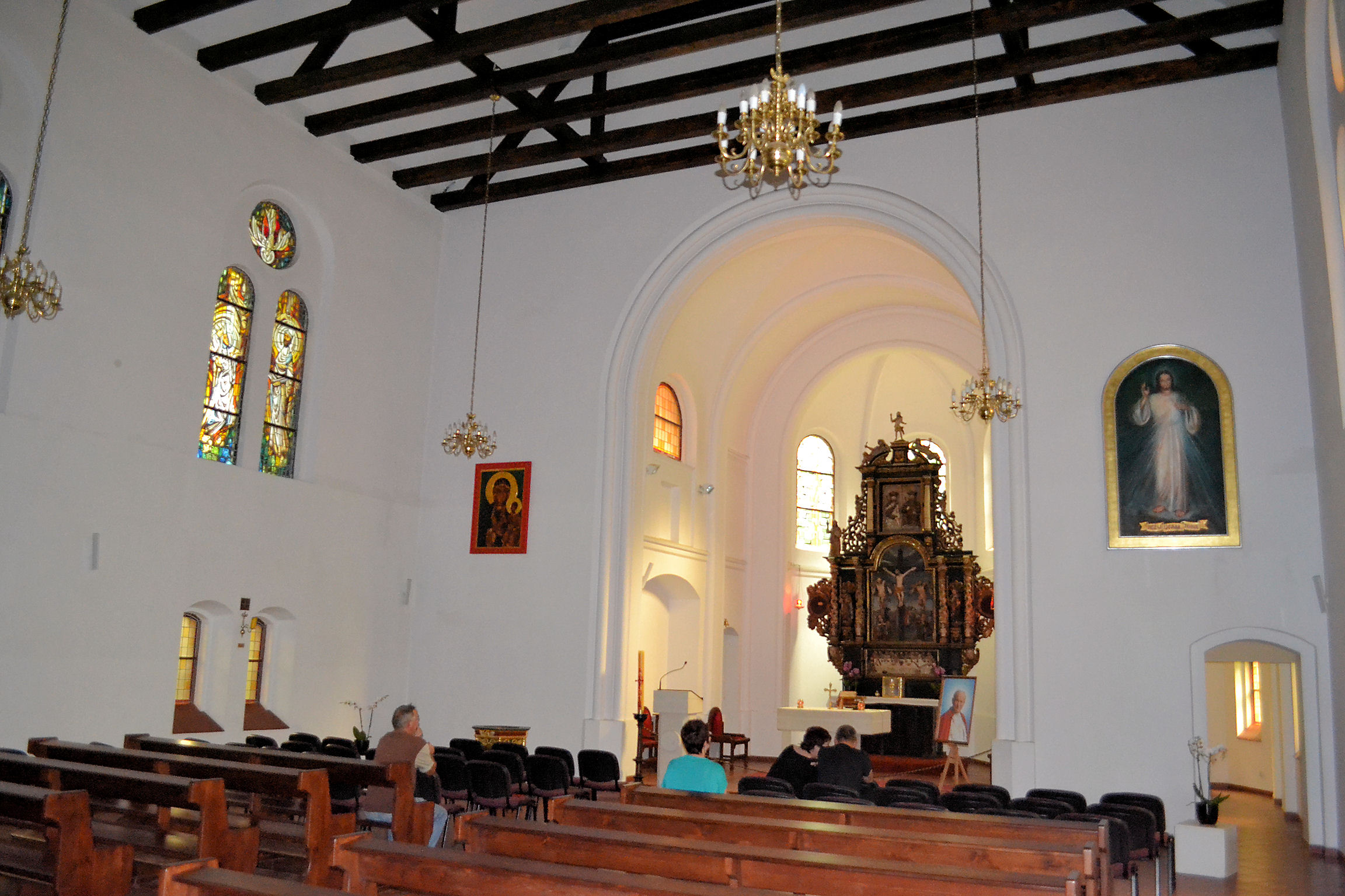 Neogotycki kościół Miłosierdzia Bożego w Trzęsaczu